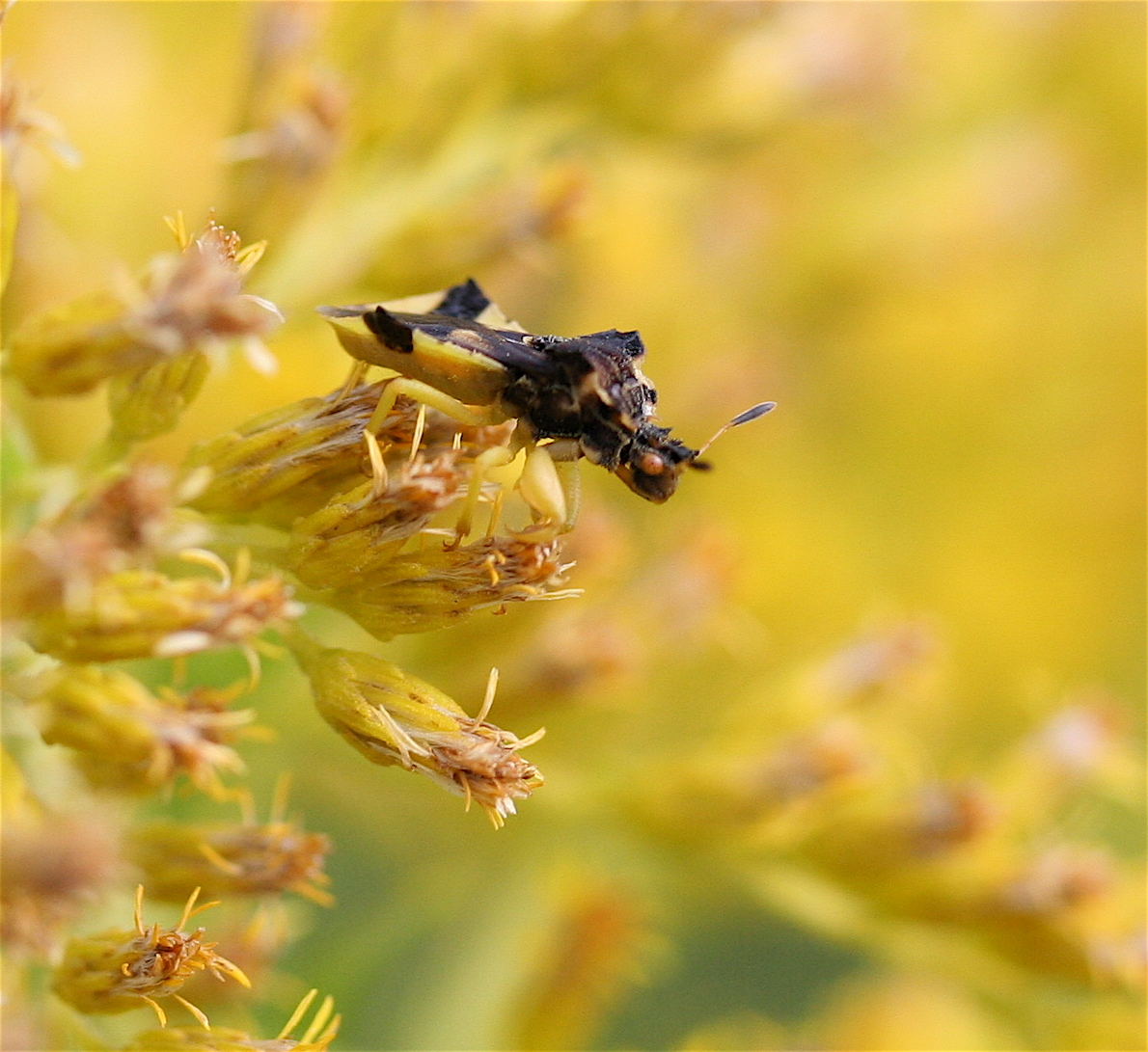 Hemiptera - Reduviidae - male Phymata pennsylvanica